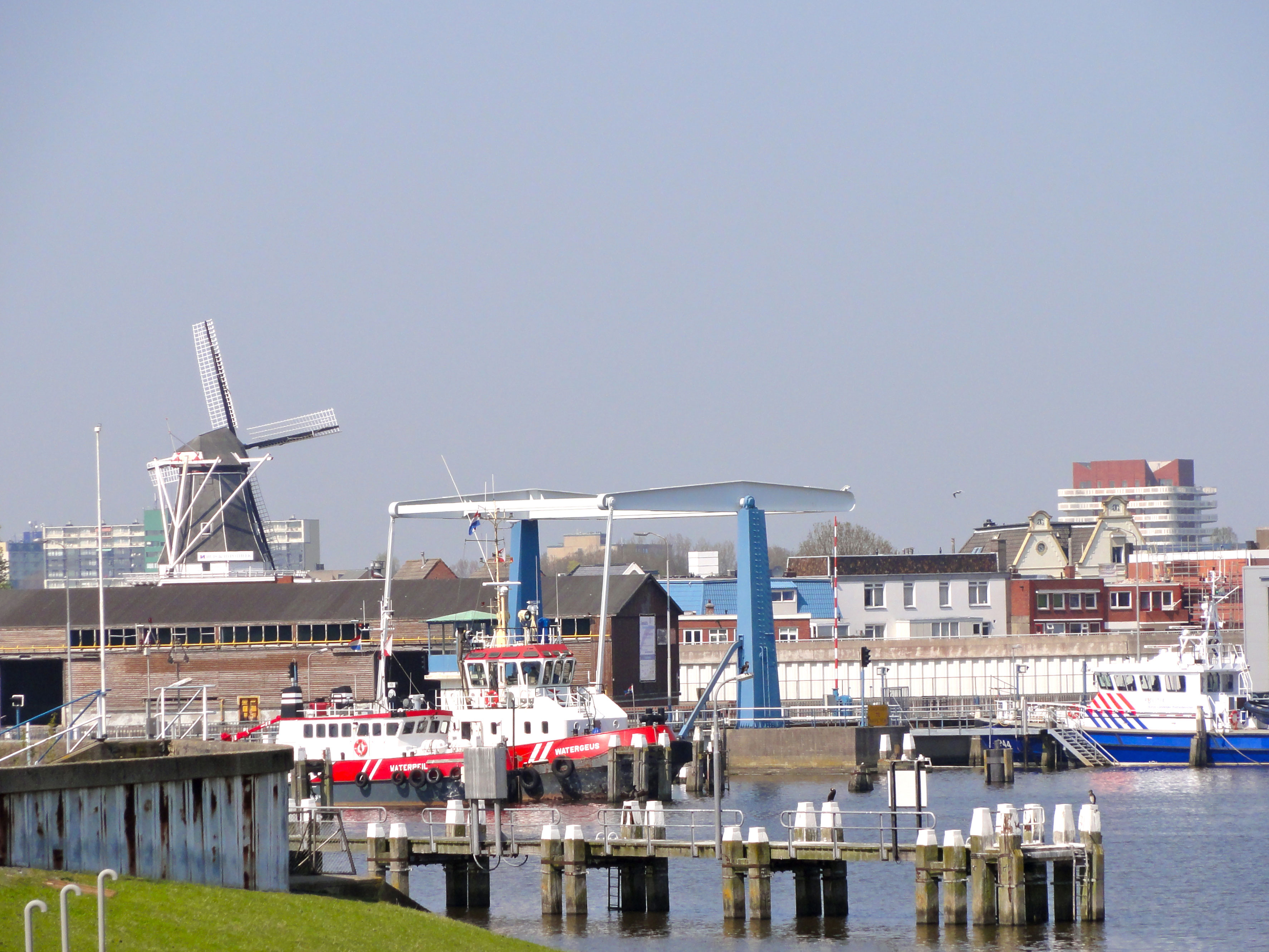 Zicht op Delfzijl met molen Adam